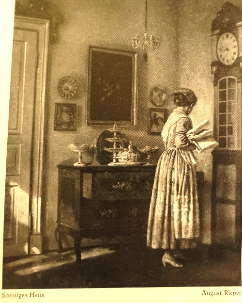 Hausangestellte im Biedermeier-Interieur